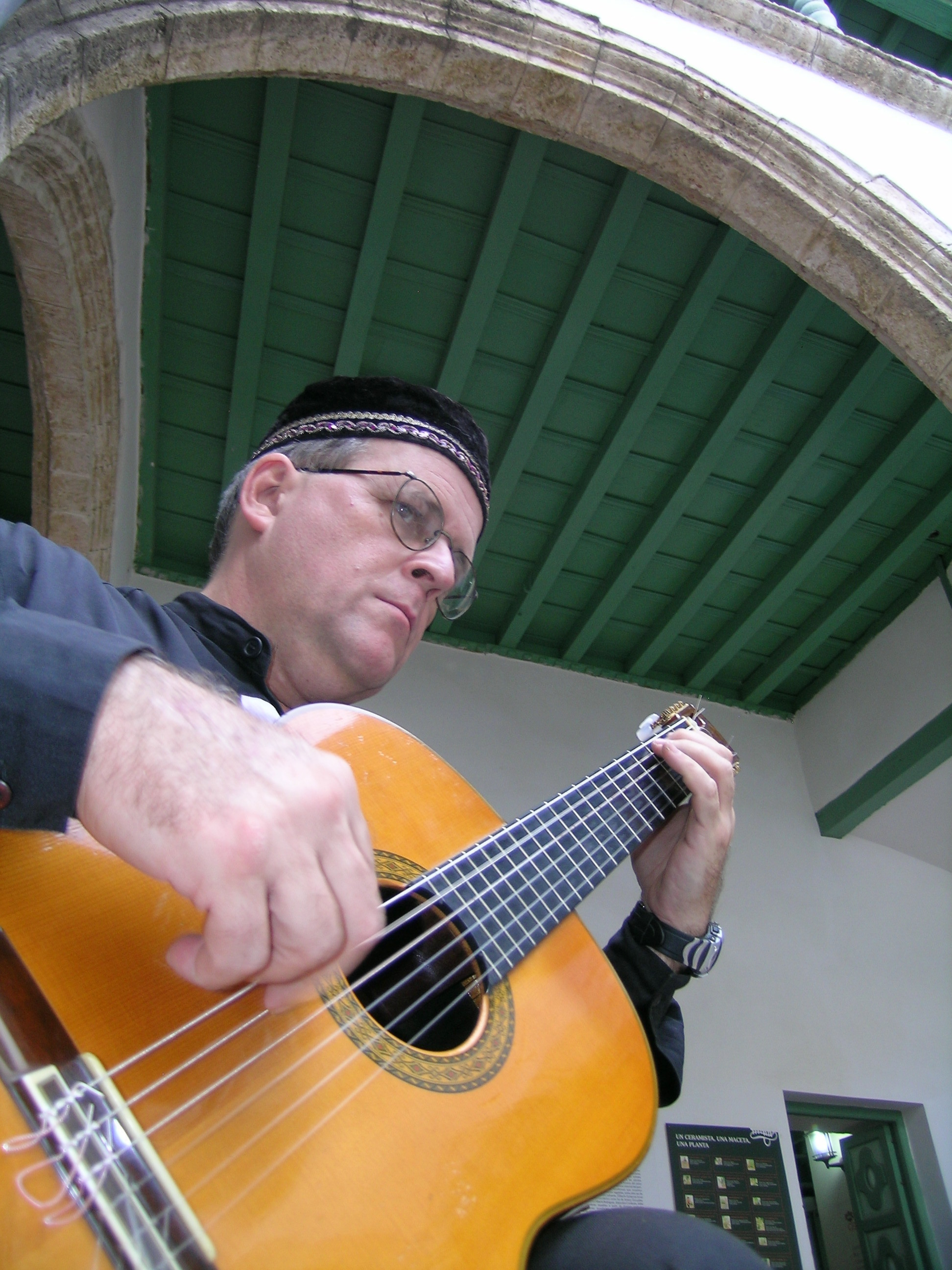 Gran concierto en el museo de Bellas Artes 2012